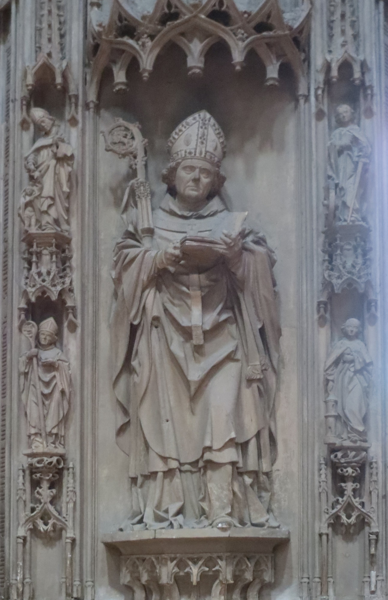 Epitaph von Erzbischof Diether von Isenburg-Büdingen im Mainzer Dom († 1482)